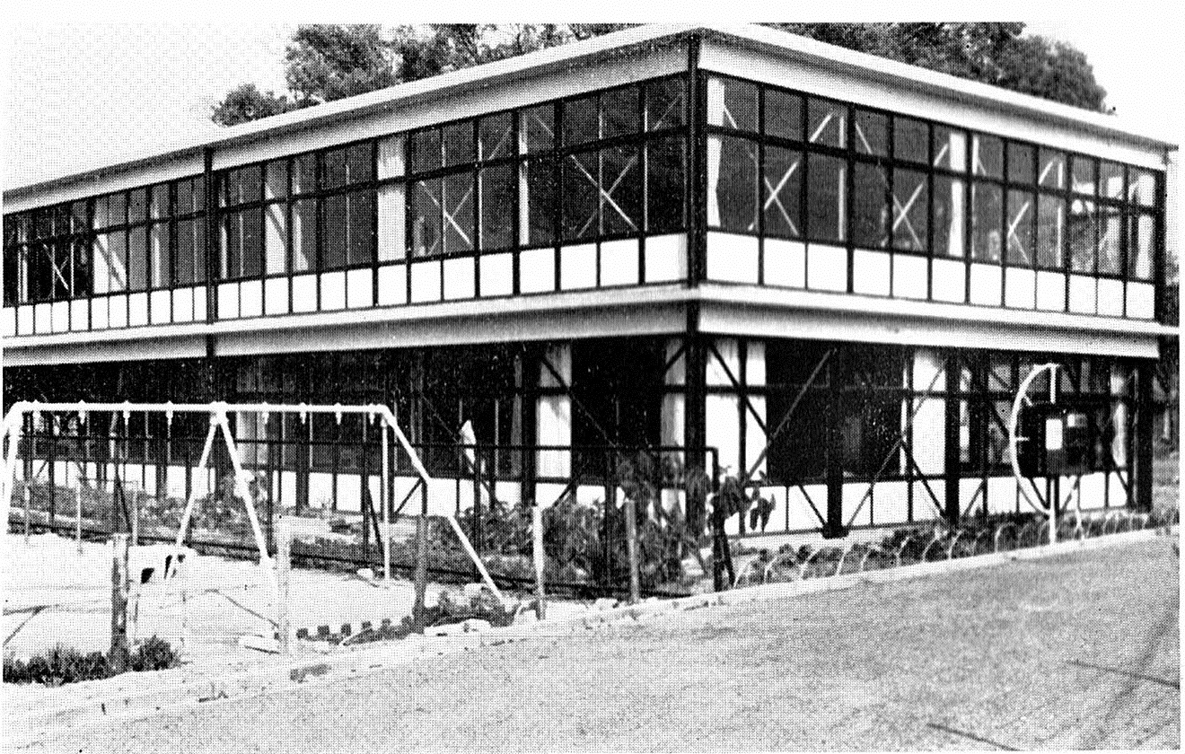 『守山市史』より、守山市中央公民館